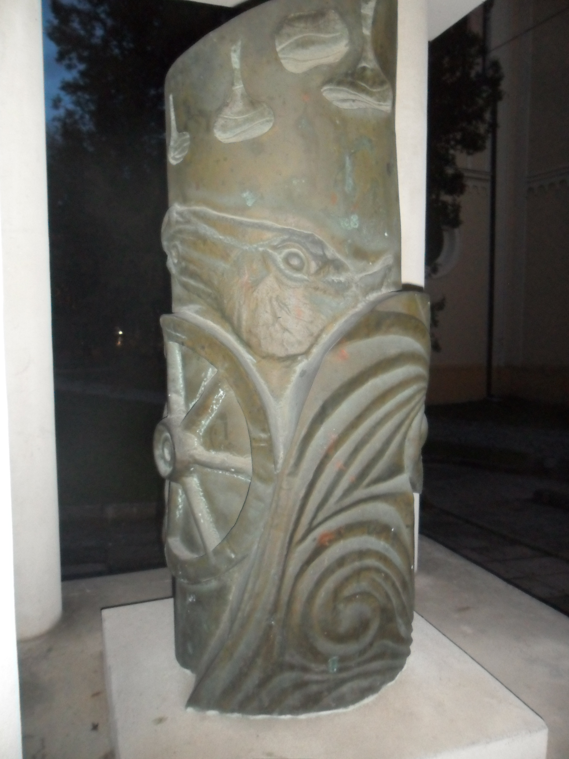 A biskói komptragédia 100. évfordulójára állított emlékmű Pakson